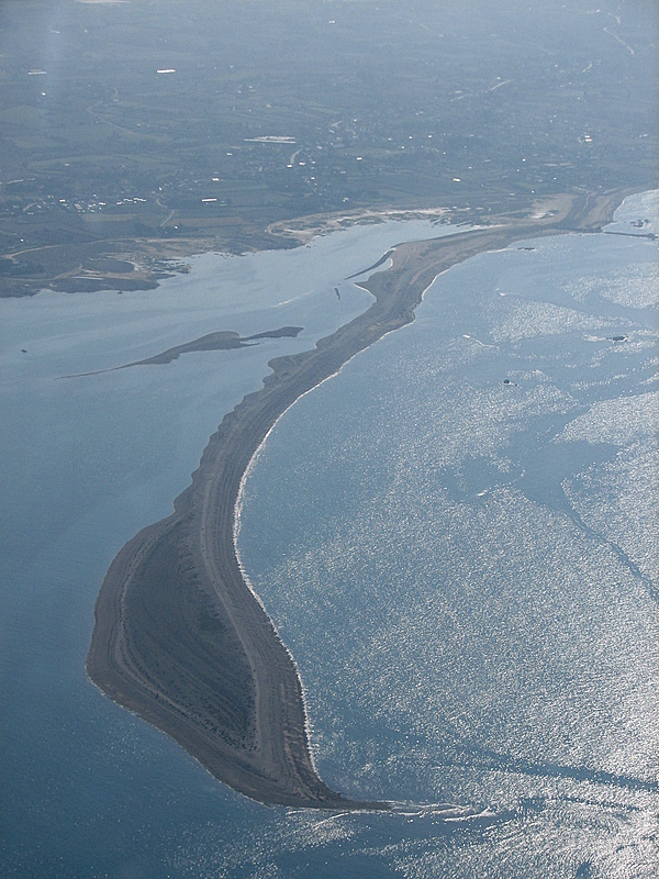 Photographie aérienne du Sillon du Talbert à marée haute / Sillon du Talbert (France), airborne photograph at high tide